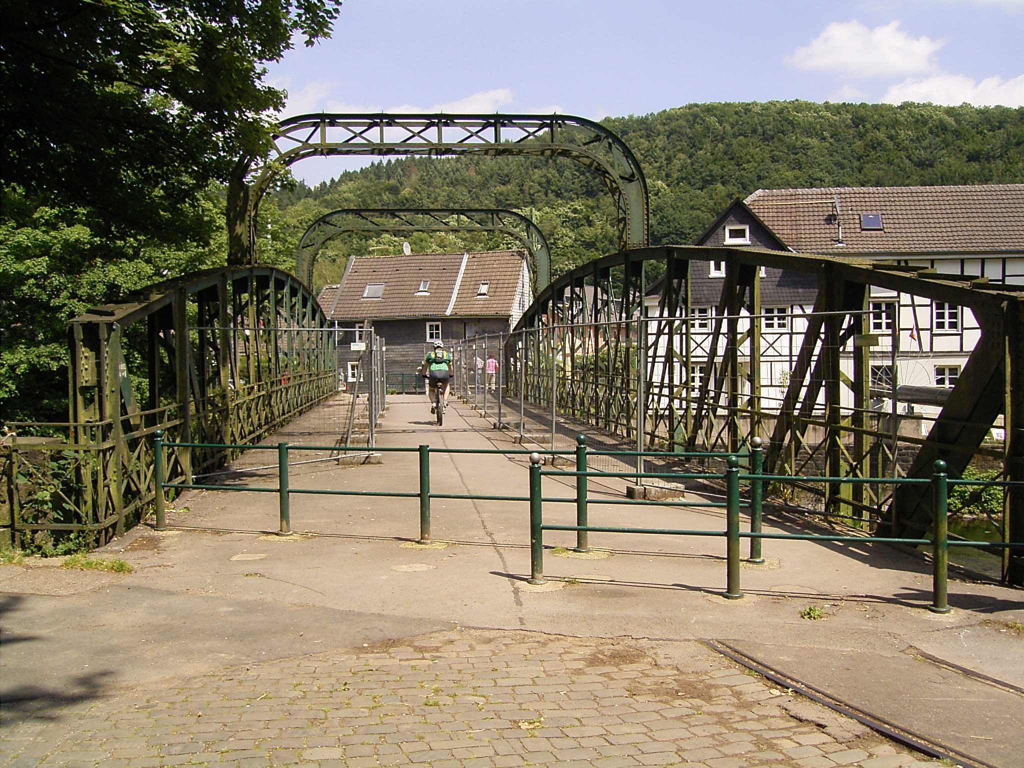 Kohlfurther Brücke über die Wupper in Wuppertal / Solingen